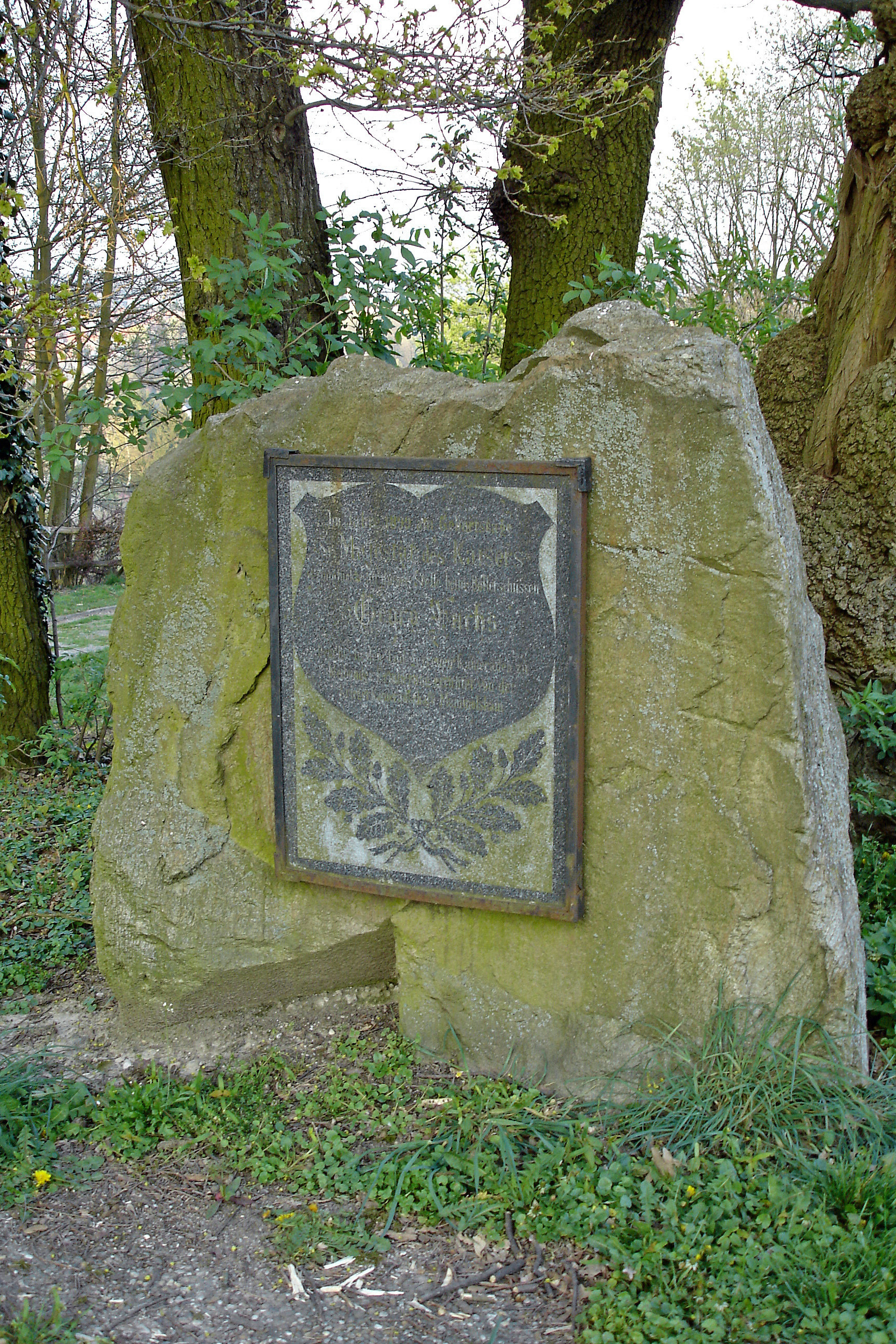 Gedenkstein für Eugen Fuchs, Am Moenchswald in Mammolshain (Koenigstein im Taunus).